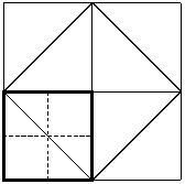 schéma esclave (Platon, le Ménon)